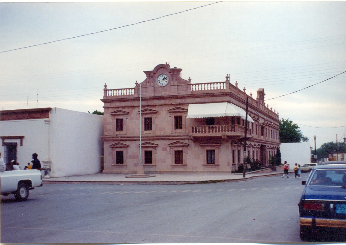 Presidencia Municipal, Parras Coahuila